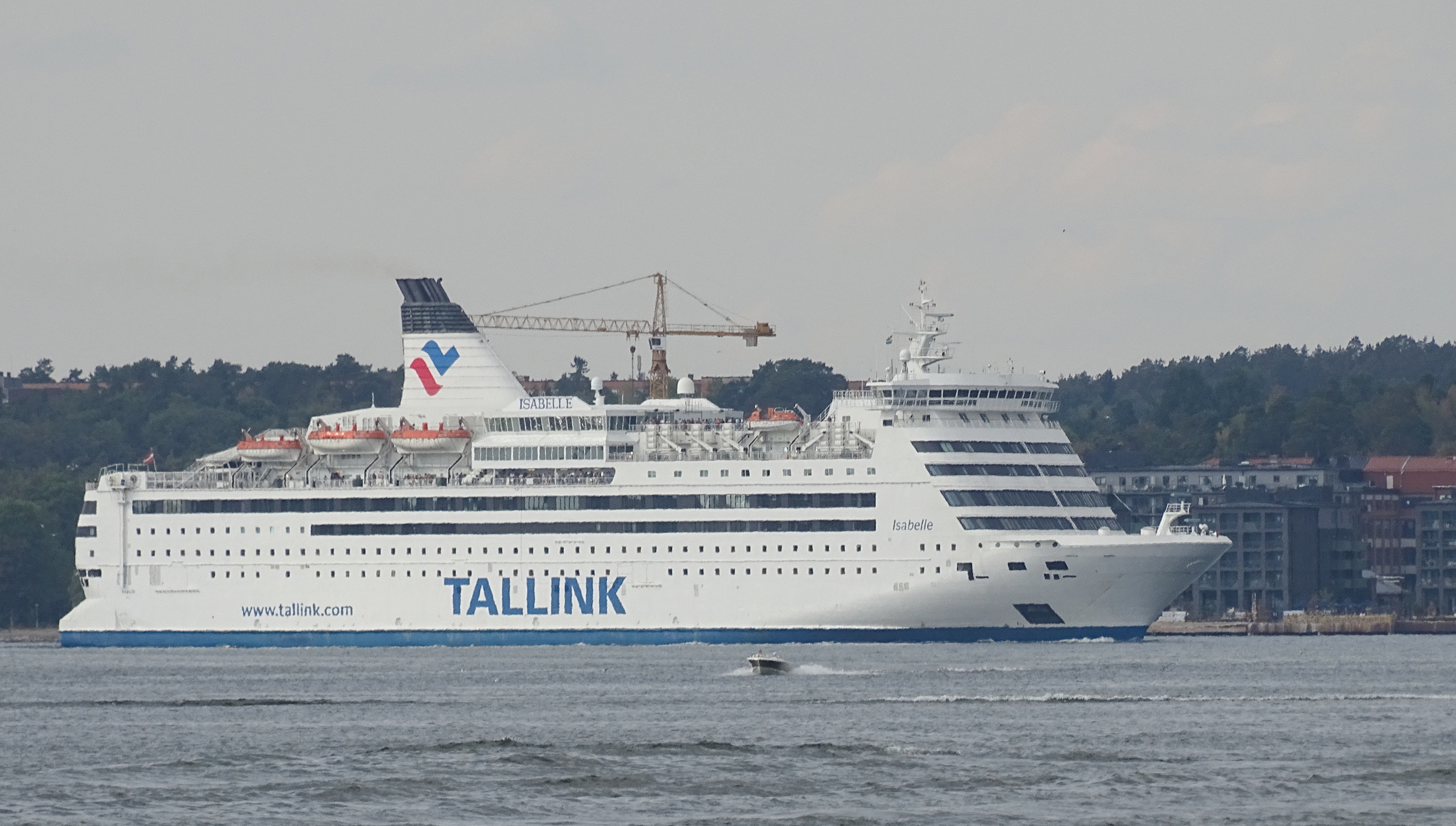 De cruiseferry Tallink MS Isabelle .